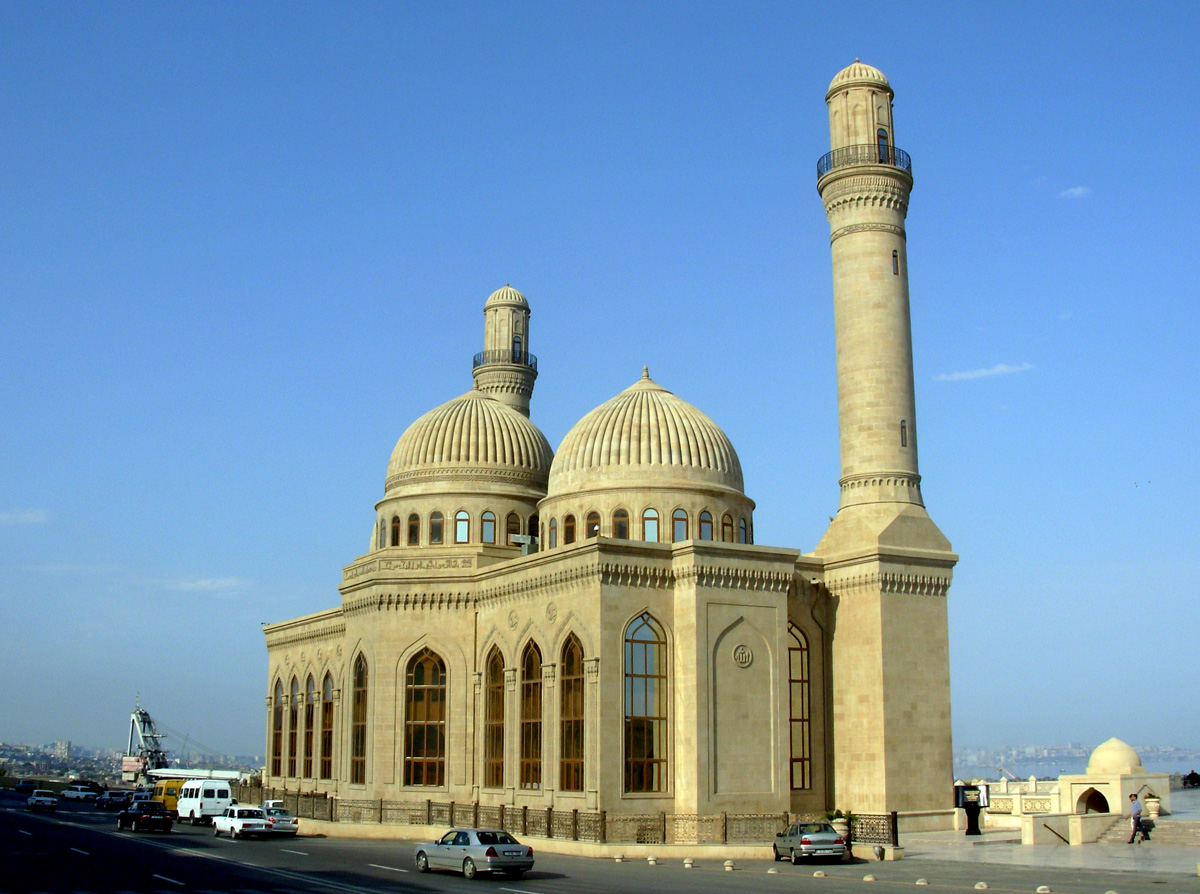 Bibi Heybat Mosque in Baku, Azerbaijan